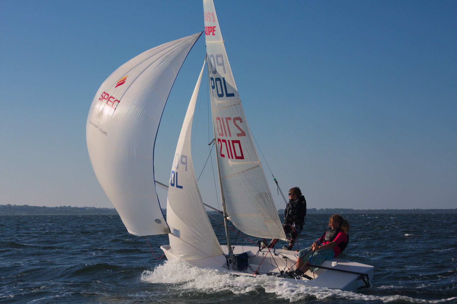 Jacht klasy L'Équipe w ślizgu na kursie półwiatr. Trening na Zatoce Puckiej.